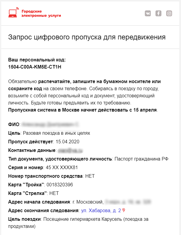 Пример полученного на электронную почту цифрового пропуска для передвижения по Москве (на изображении скрыты ФИО и адрес получателя пропуска)